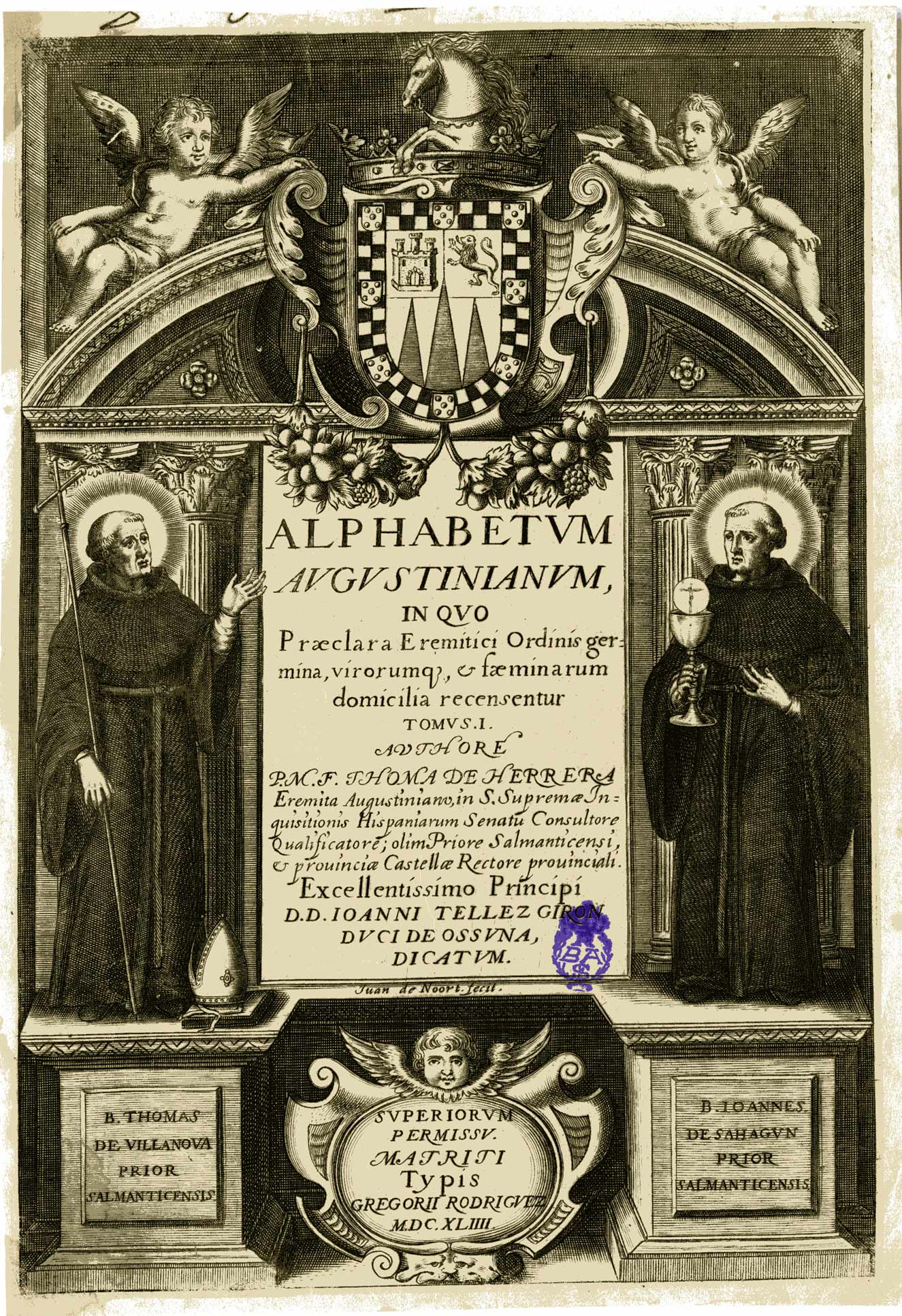 Portada de Alphabetum Augustinianum... / Authore P.M.F. Thoma de Herrera. Matriti, Typis Gregorii Rodriguez, 1644 (Tomo I). A los lados, Santo Tomás de Villanueva y San Juan de Sahagún.